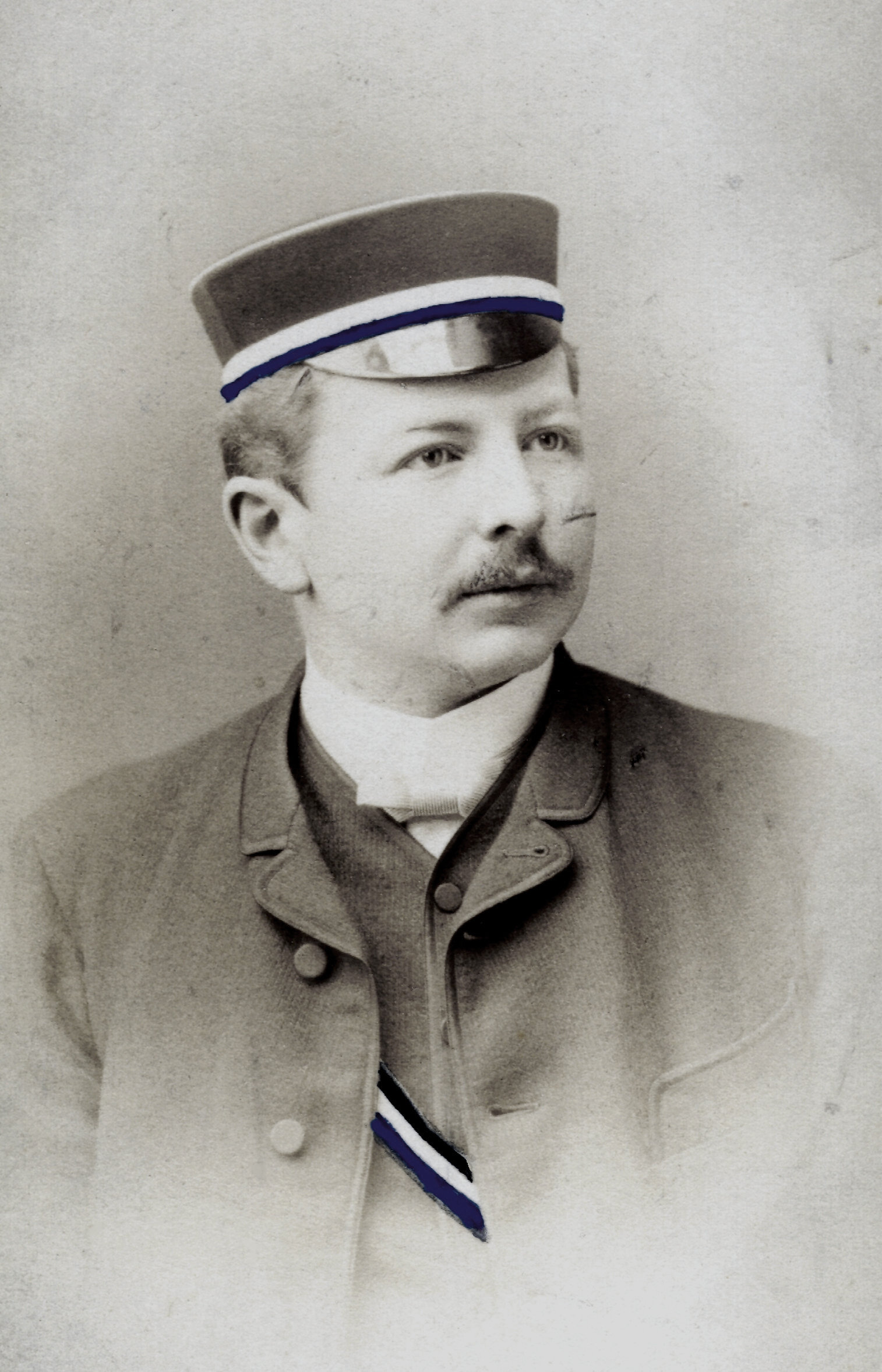 Porträtfotografie des jungen Richard Du Moulin-Eckart.